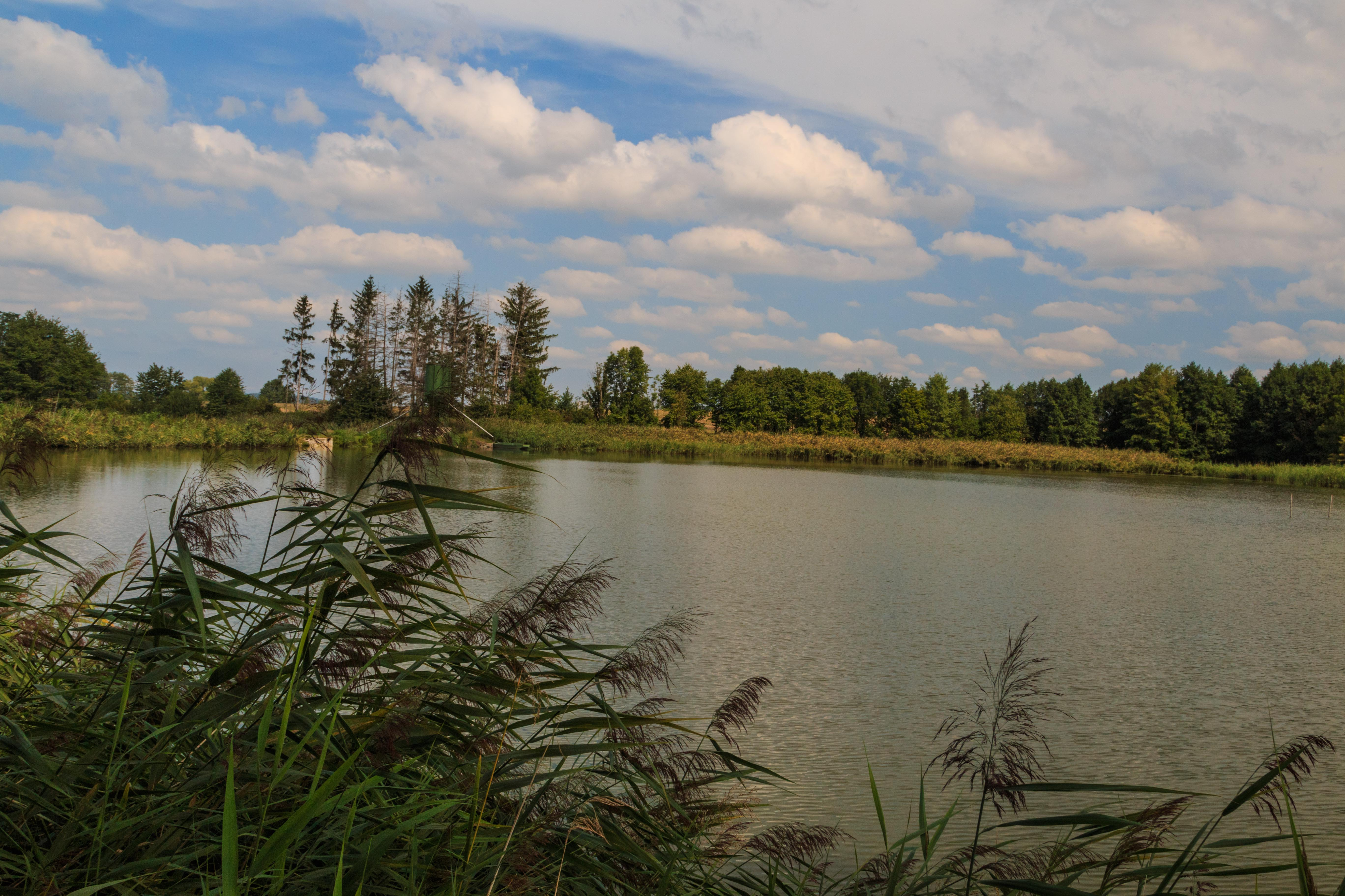 Horní Heřmanický rybník